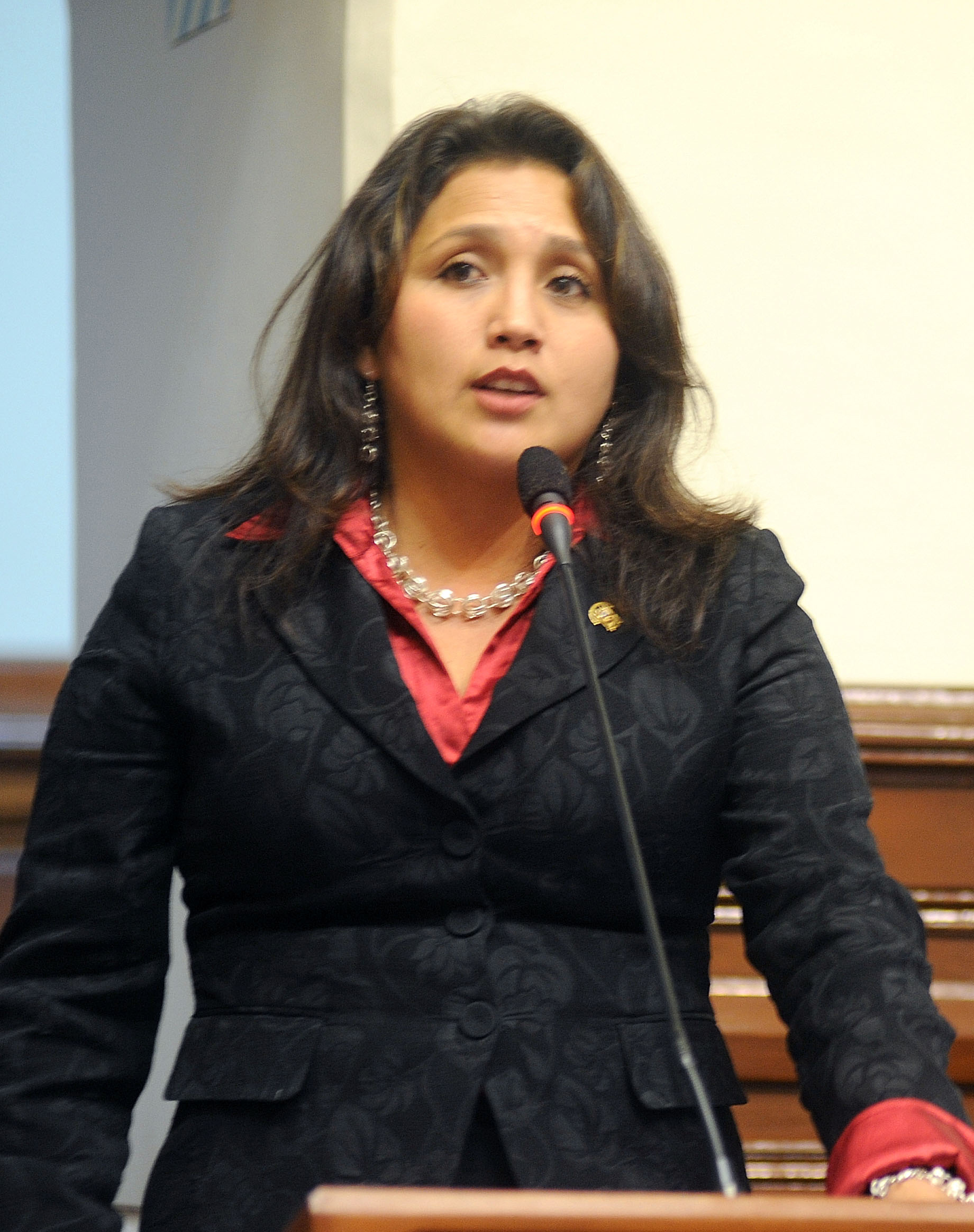 Ana María Solórzano, congresista y Presidenta del Congreso de la República del Perú (2014-2015).